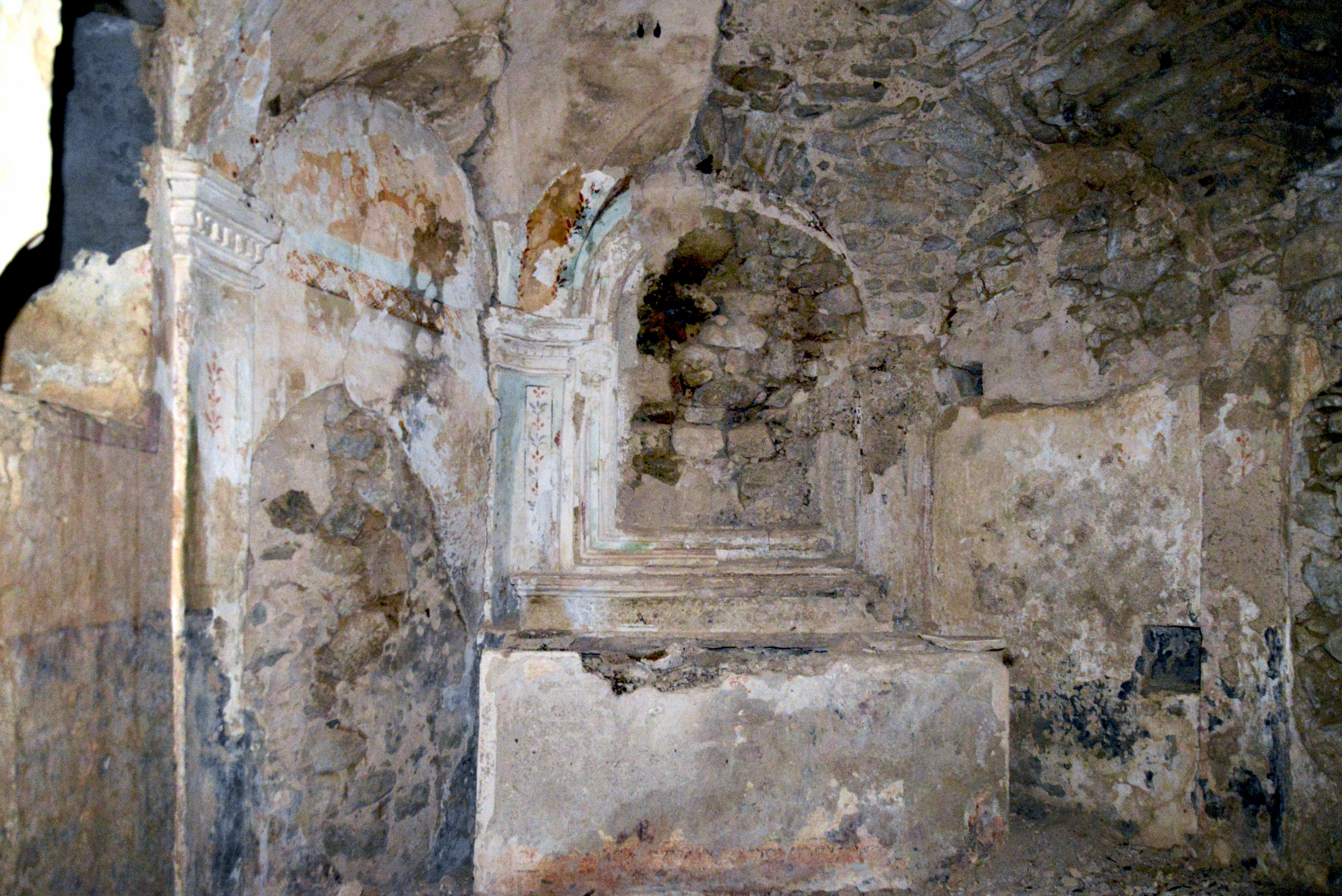 Muracciole, Centre Corse (Haute-Corse) - Chapelle latérale gauche de l'ancienne église Santa-Maria-d'Arca.